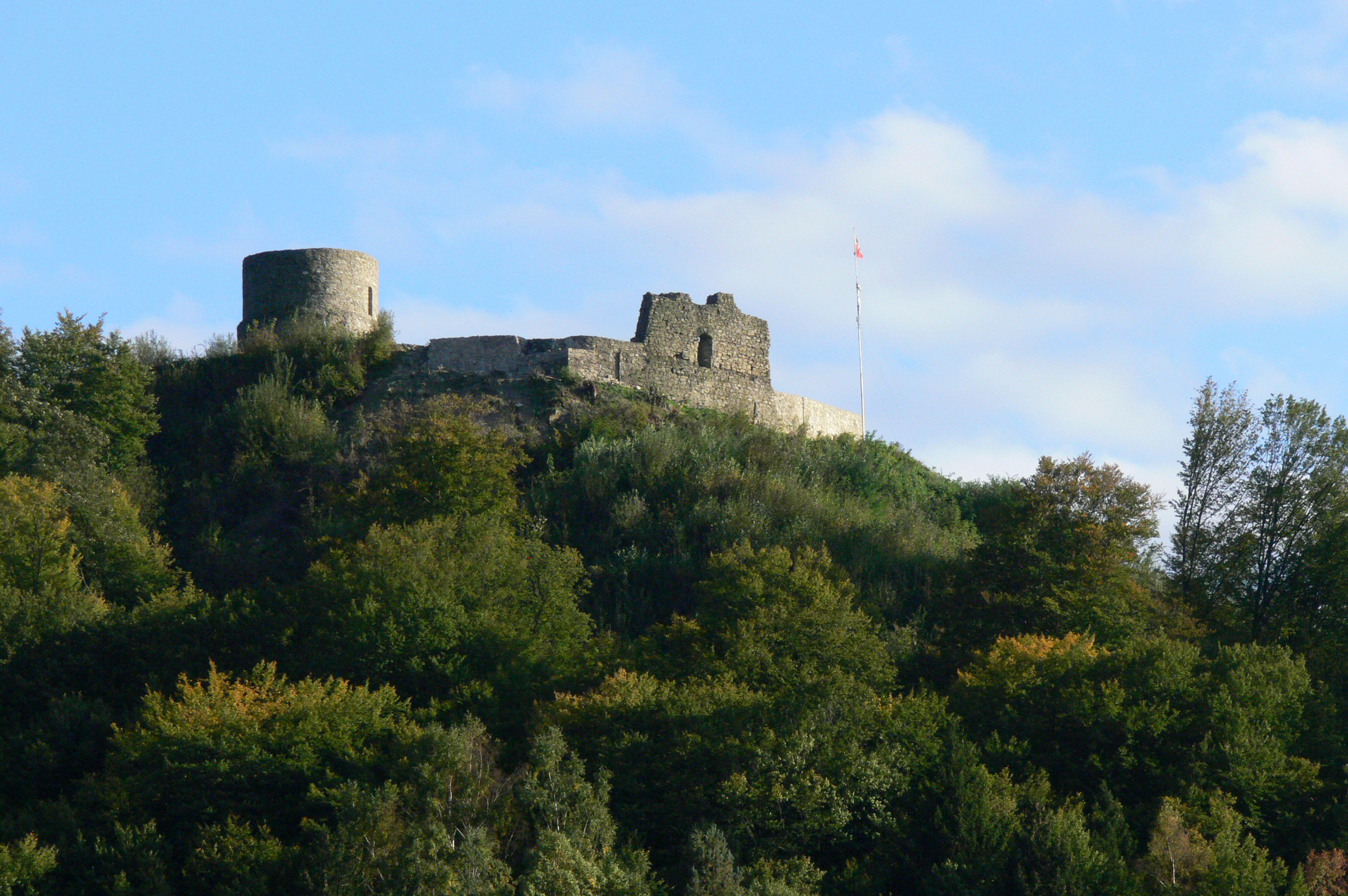 Rytro, ruiny zamku, XV